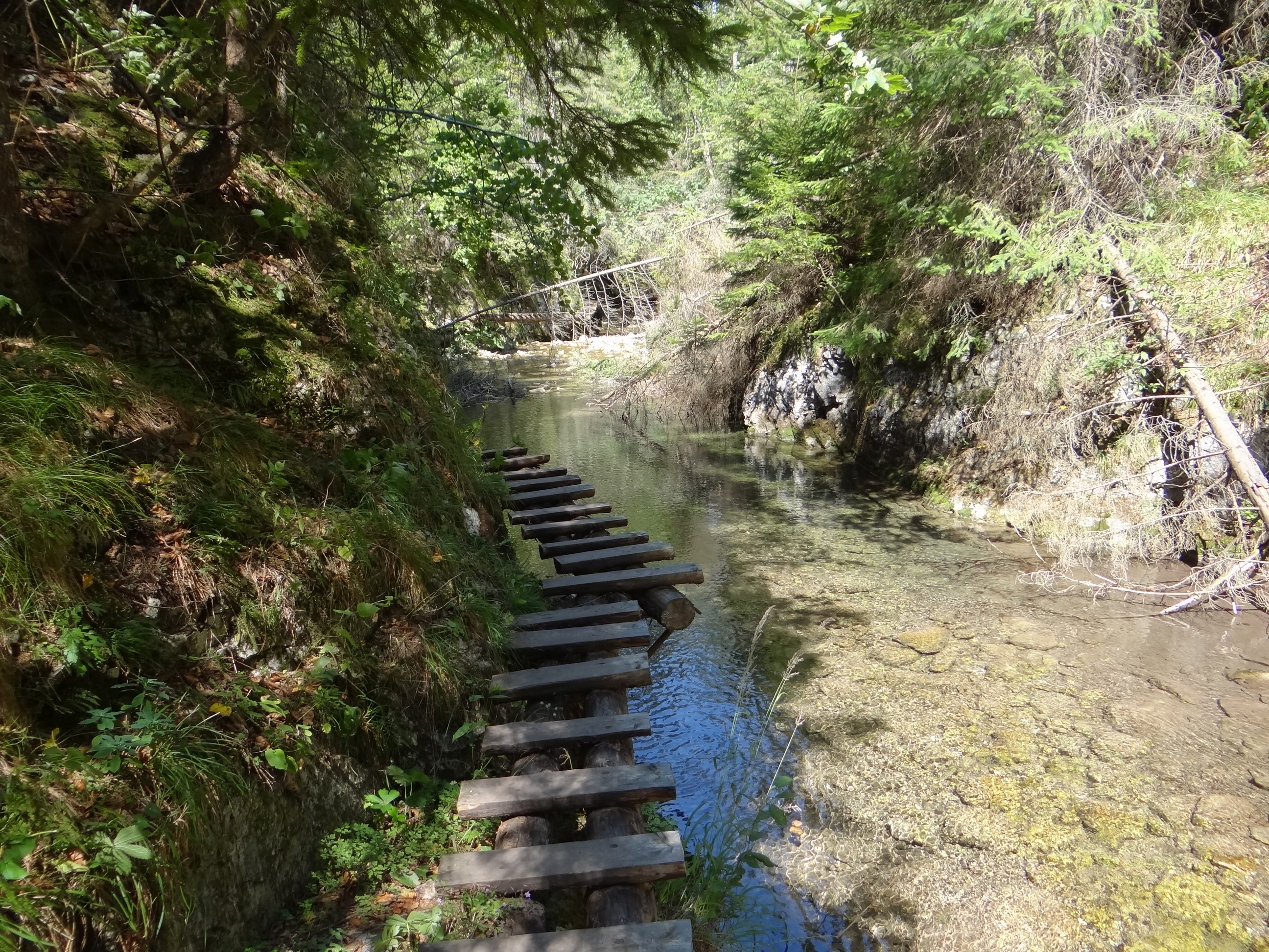 Biely potok (prítok Hornádu